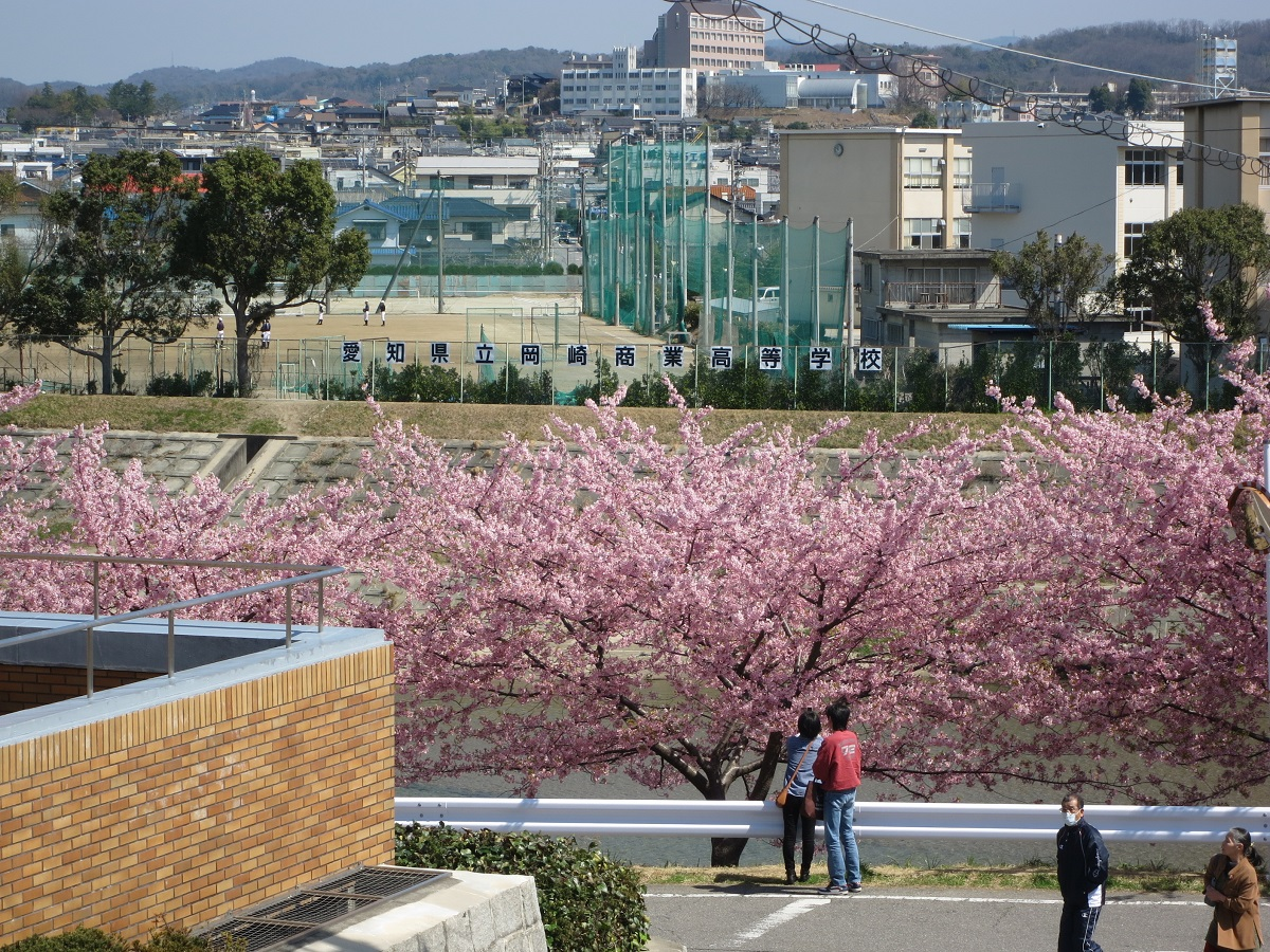 愛知県立岡崎商業高等学校